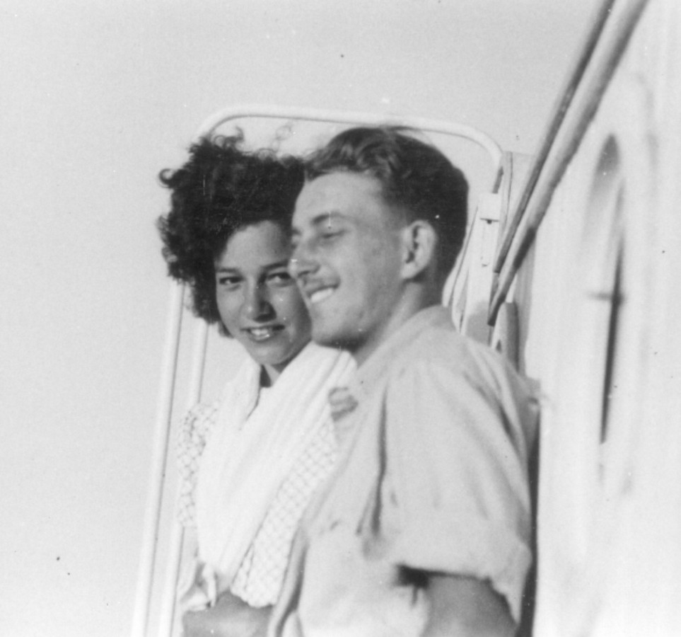 חטיבת יפתח - הגדוד השלישי - הכשרות - 9 - הכשרת הצופים ד' עין-גב - על הספינה "סוסיתא". גבריאל (גבי) כהן, תמר באומגרט ז"ל